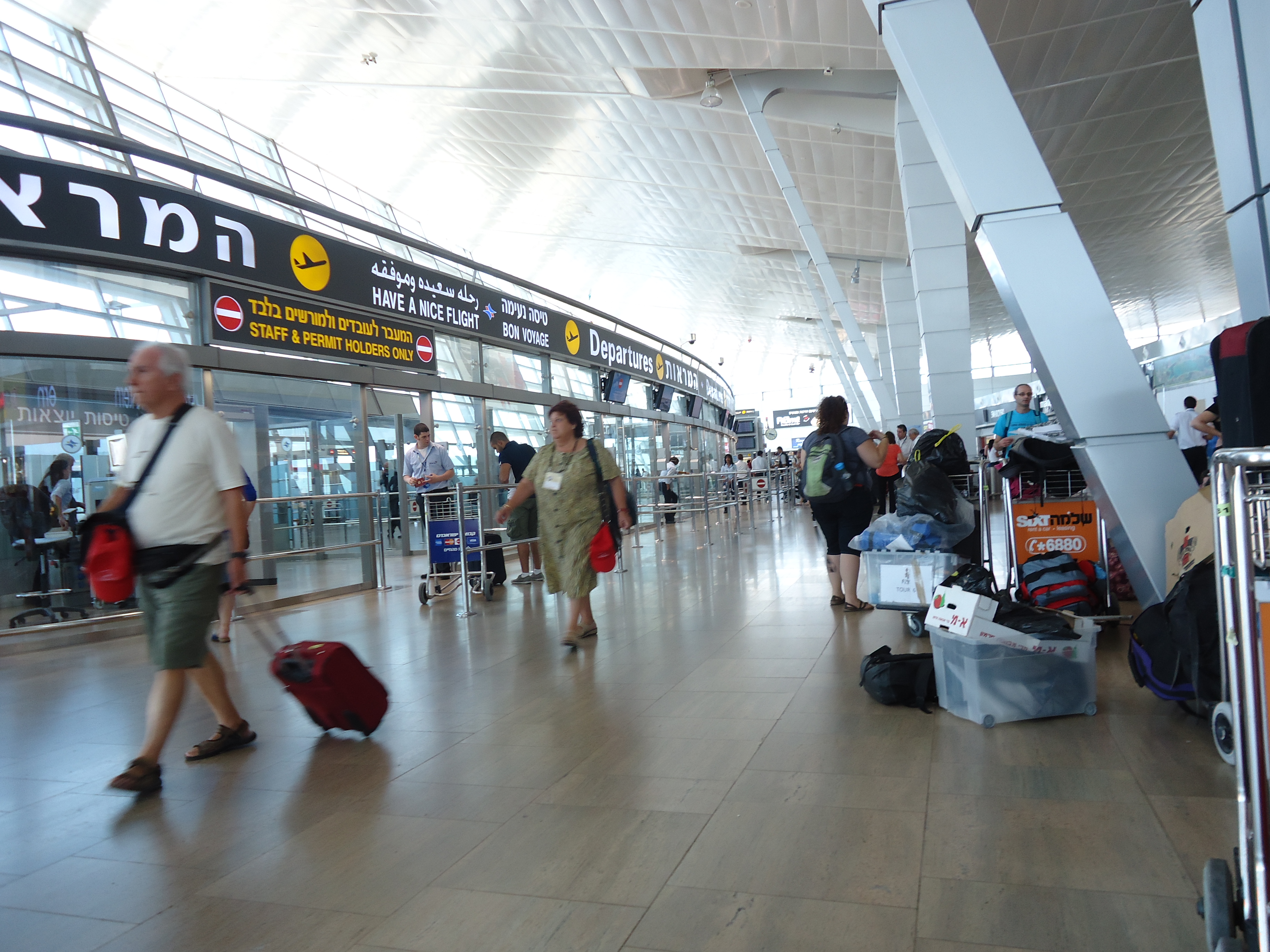 Departures